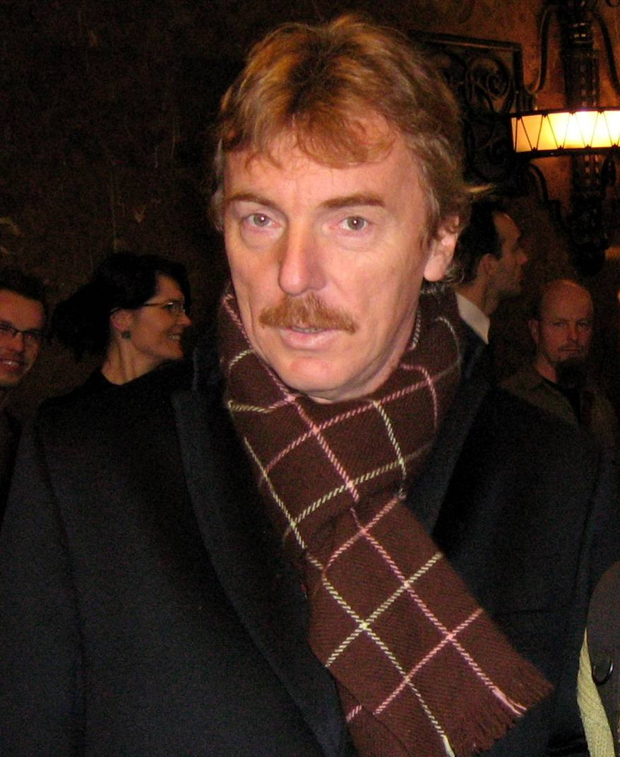 Zbigniew Boniek (ur. 3 marca 1956 w Bydgoszczy) – polski piłkarz, trener